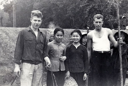 Устинов и Тит рядом с красивыми вьетнамскими девушками на фоне построенной дамбы. Фотоальбом Ивчина Анатолия Иосифовича. (Приложение к Воспоминаниям об оказании помощи Демократической Республике Вьетнам в создании зенитно-ракетных войск в 1967 г.)